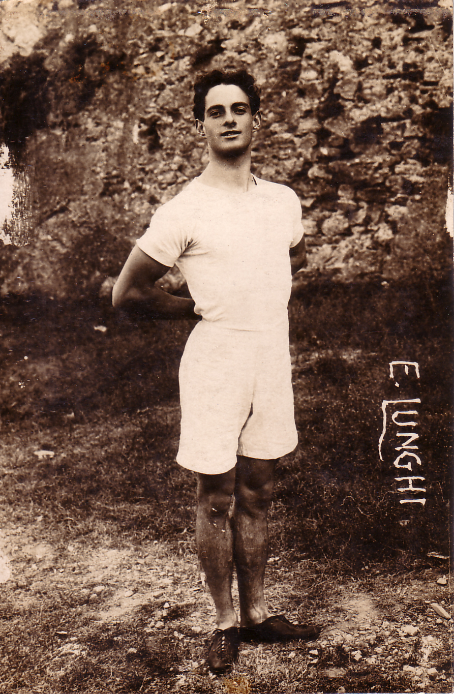 Foto scattata ad Emilio Lunghi.